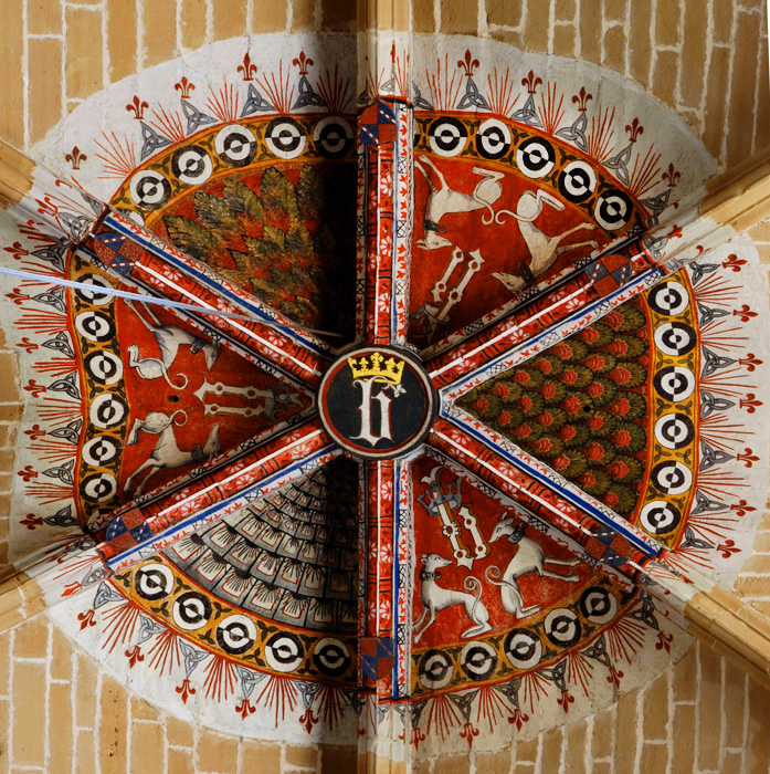 Escudo con la "B" de Blanca I de Navarra en la clave de un arco de la nave central, catedral de Pamplona.